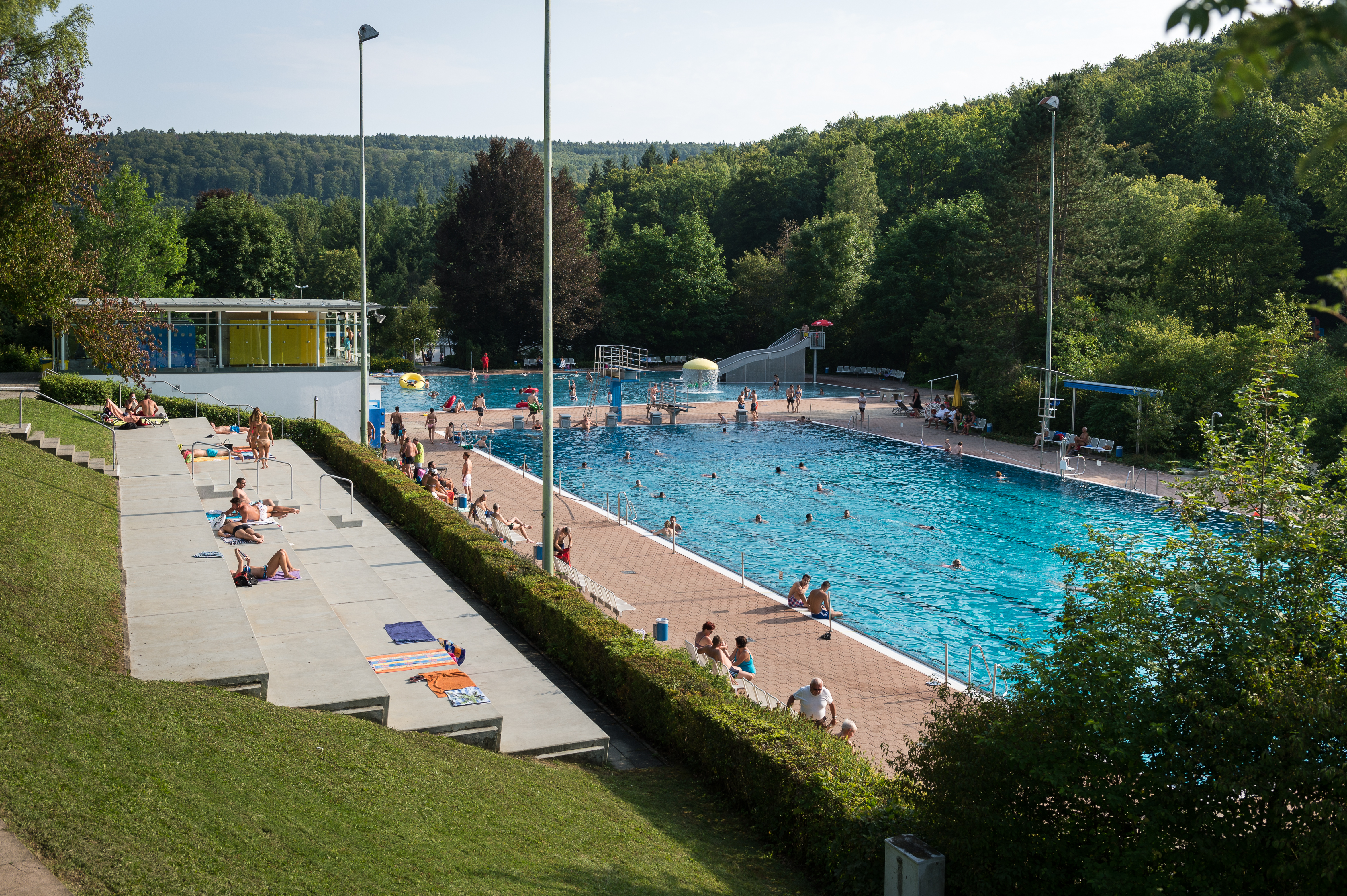 Das Waldfreibad Heidenheim am 25. August 2017.